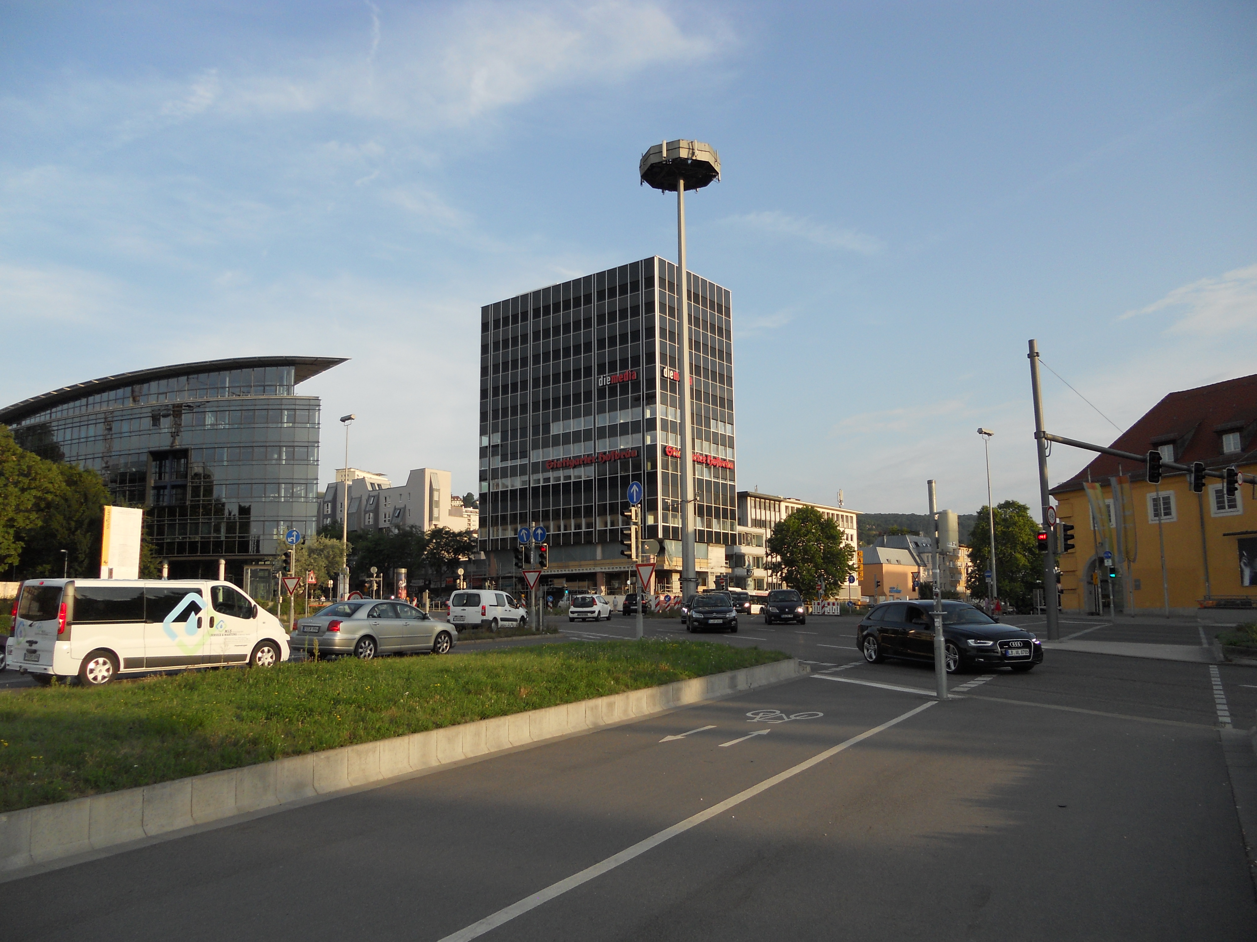 Verkehrsbauwerk Charlottenplatz in Stuttgart. Blick in Richtung Hauptstätter Straße. Rechts im Bild das Alte Waisenhaus.